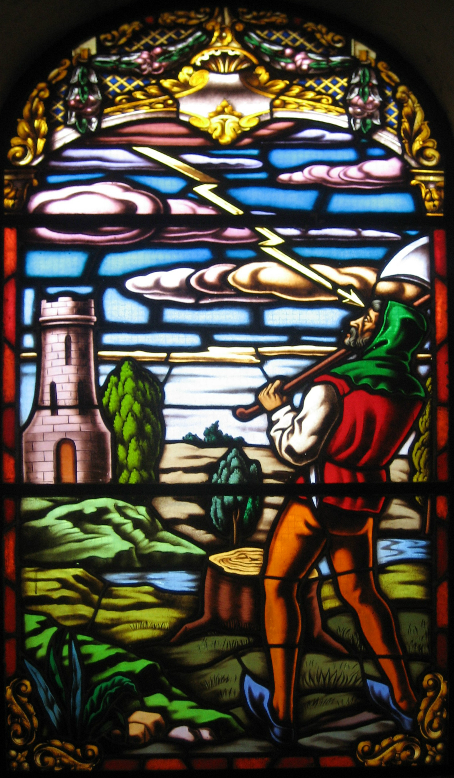 Cuba, Parroquia de San José de Jatibonico: Vitral de Santa Bárbara